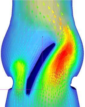 Векторное поле скорости потока через клапан ЛИКС–2